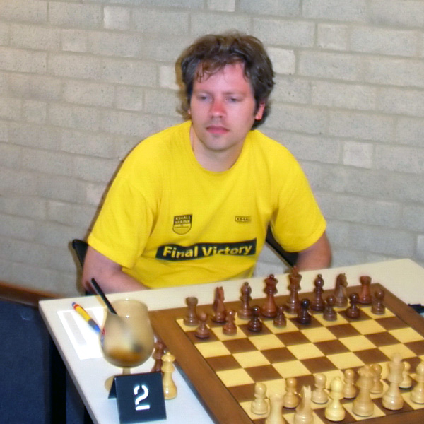 GM Dimitri Reinderman, Leiden 2007